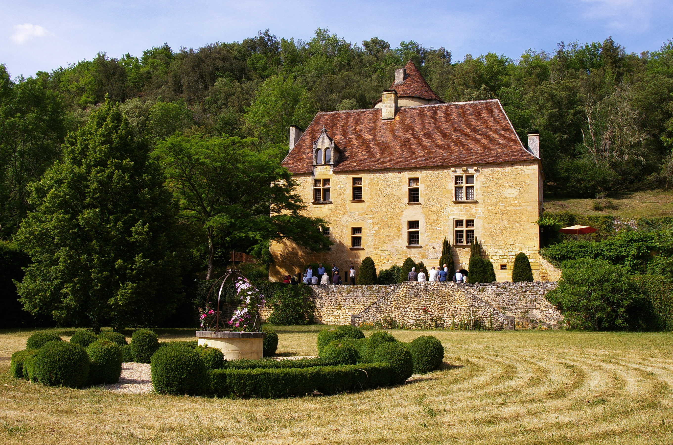 Manoir de Roucaudou, Manaurie.